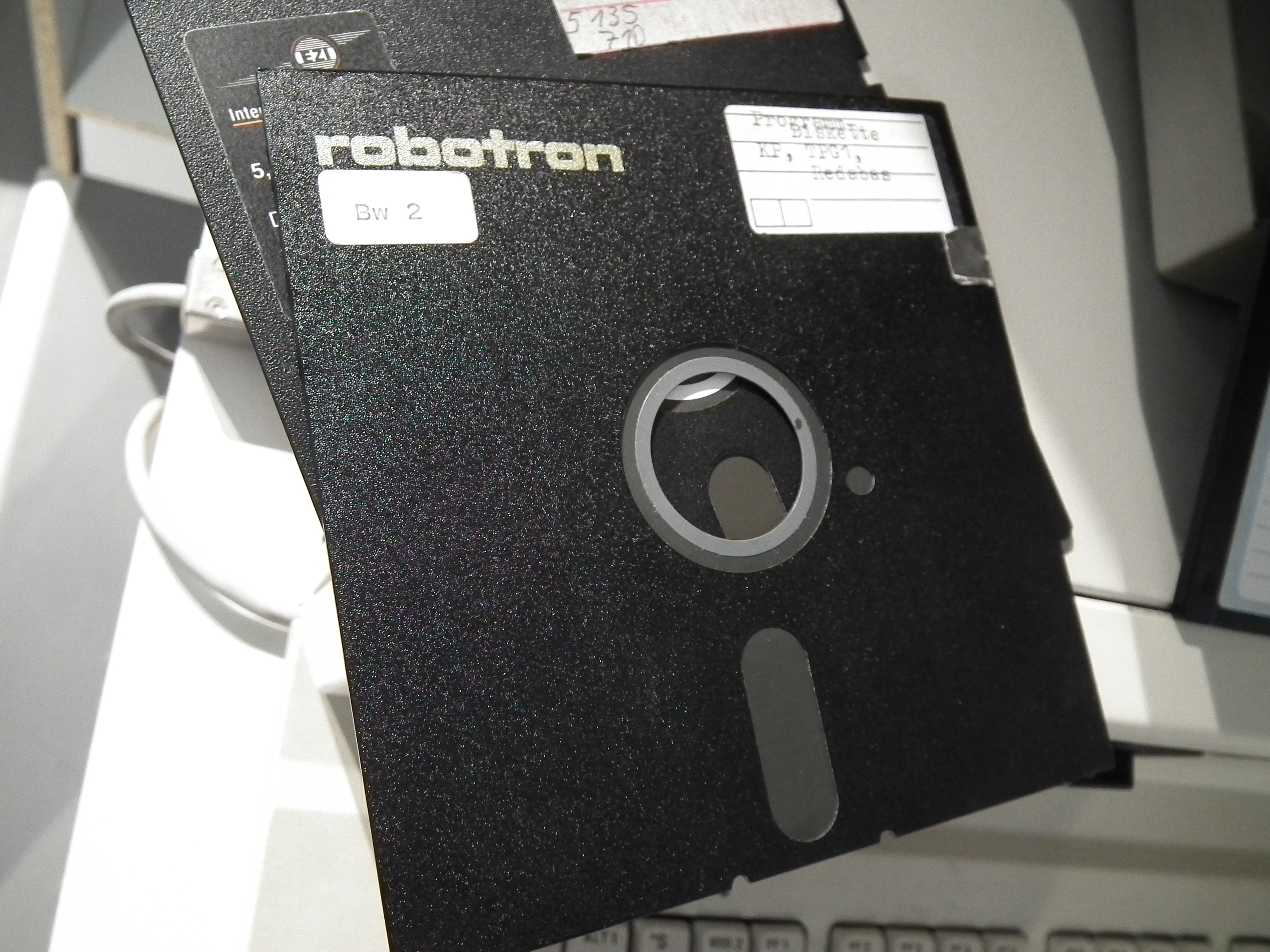 Dresden - Die Welt der DDR